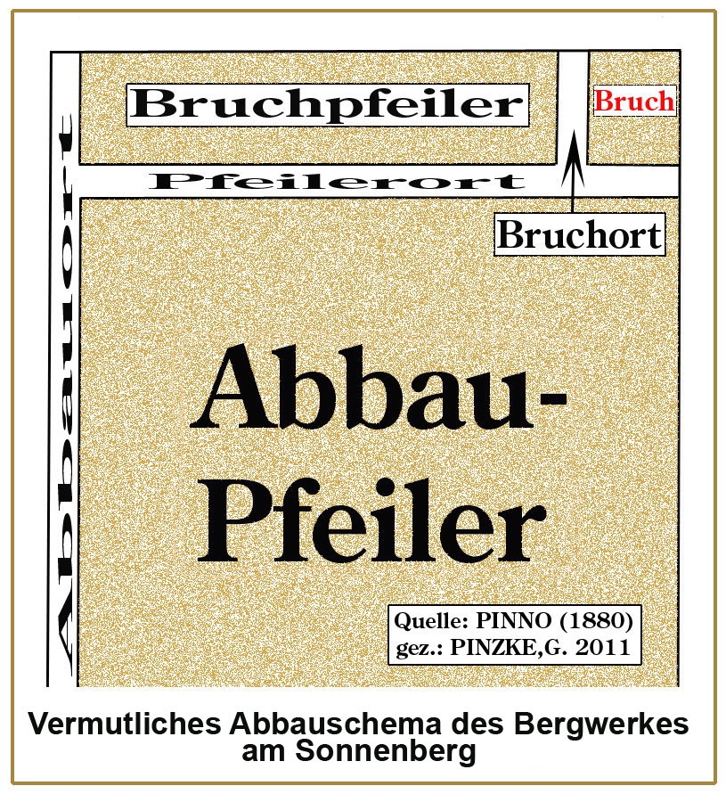 Vermeintliches Abbauschema des Bergwerkes am Sonnenberg.